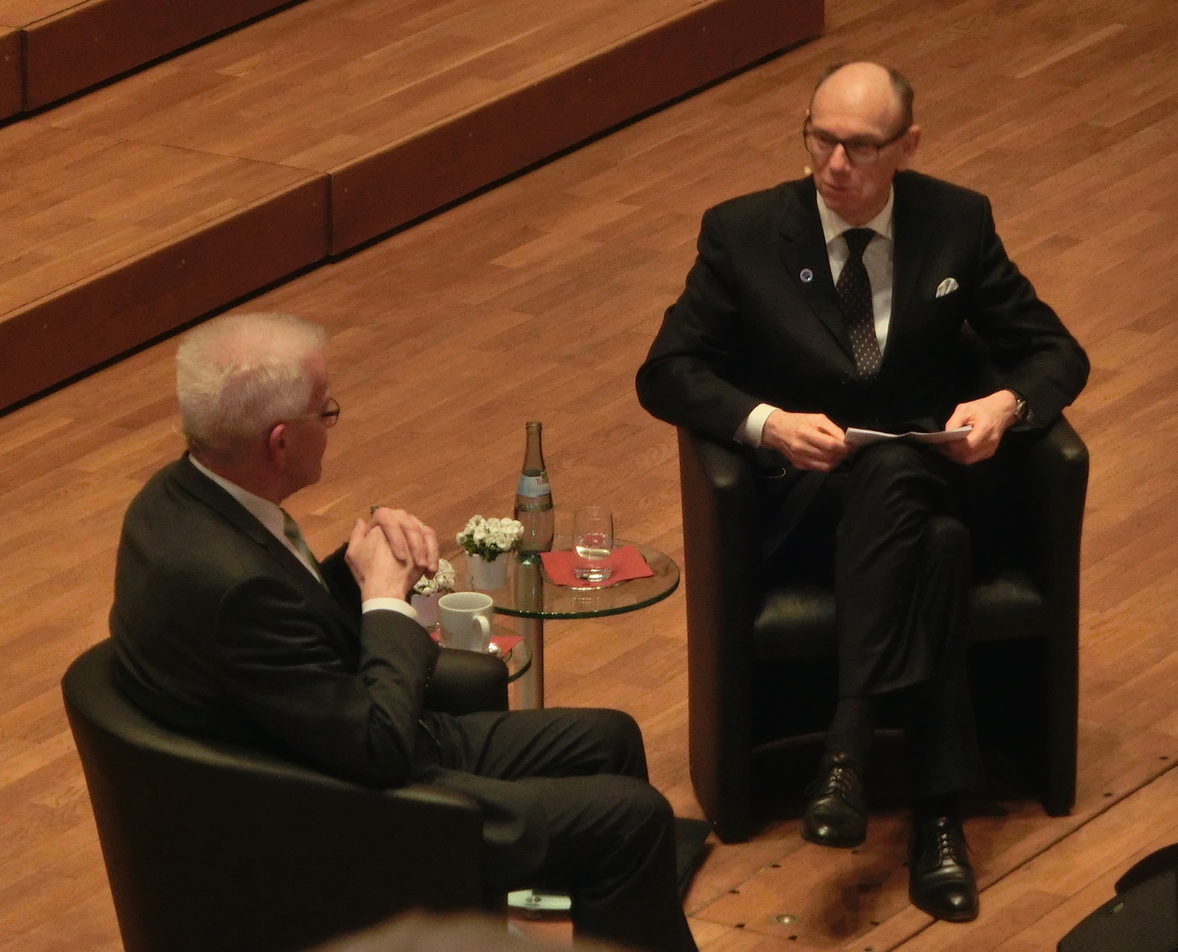 Eberhard Stilz (* 1949), Präsident der Stifung Weltethos, im Gespräch mit dem baden-württembergischen Ministerpräsidenten Winfried Kretschmann (Grüne) im Rahmen der 12. Weltethos-Rede an der Eberhard Karls Universität Tübingen.